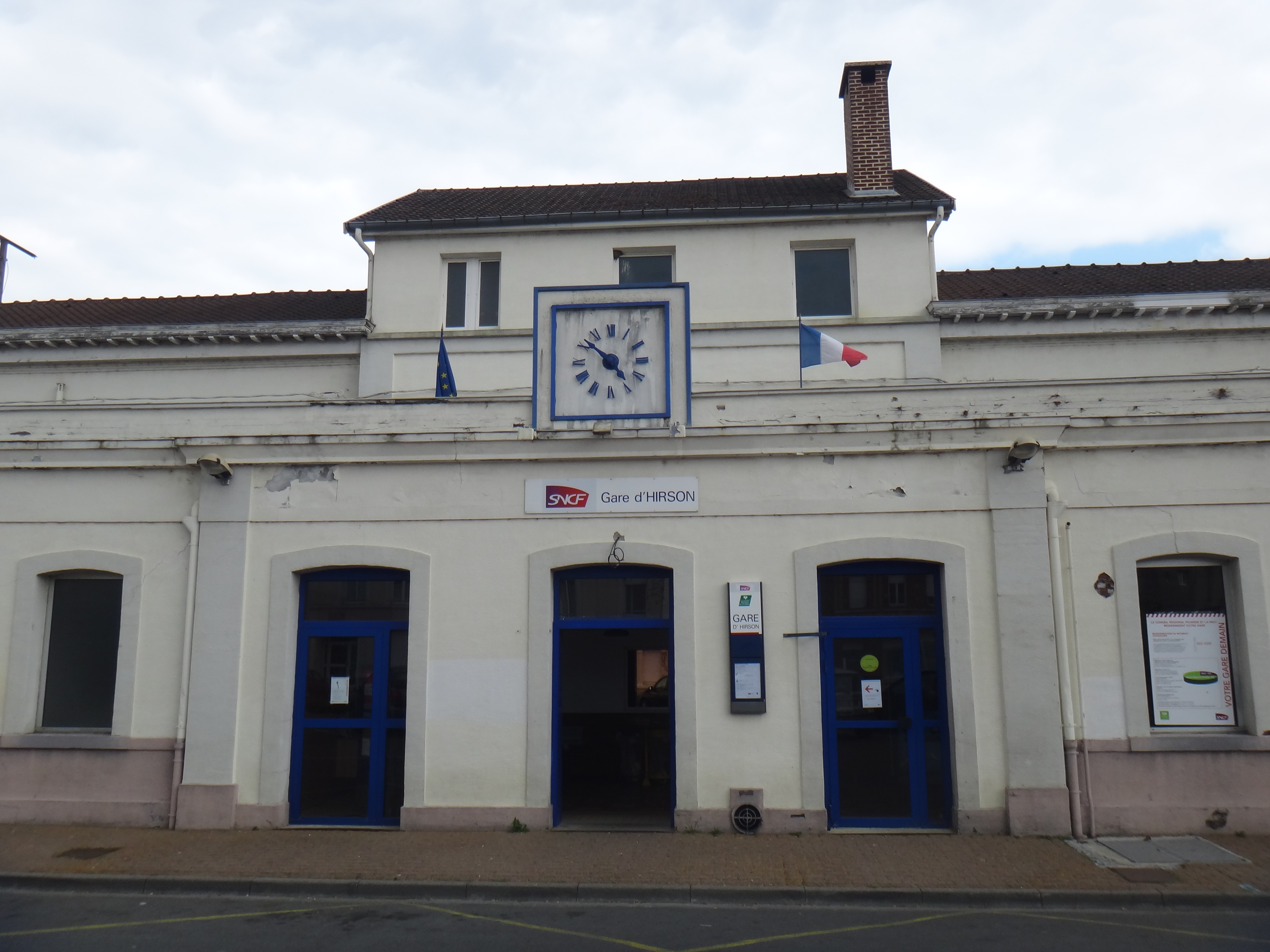 Gare d'Hirson, Aisne, France, en 2014.